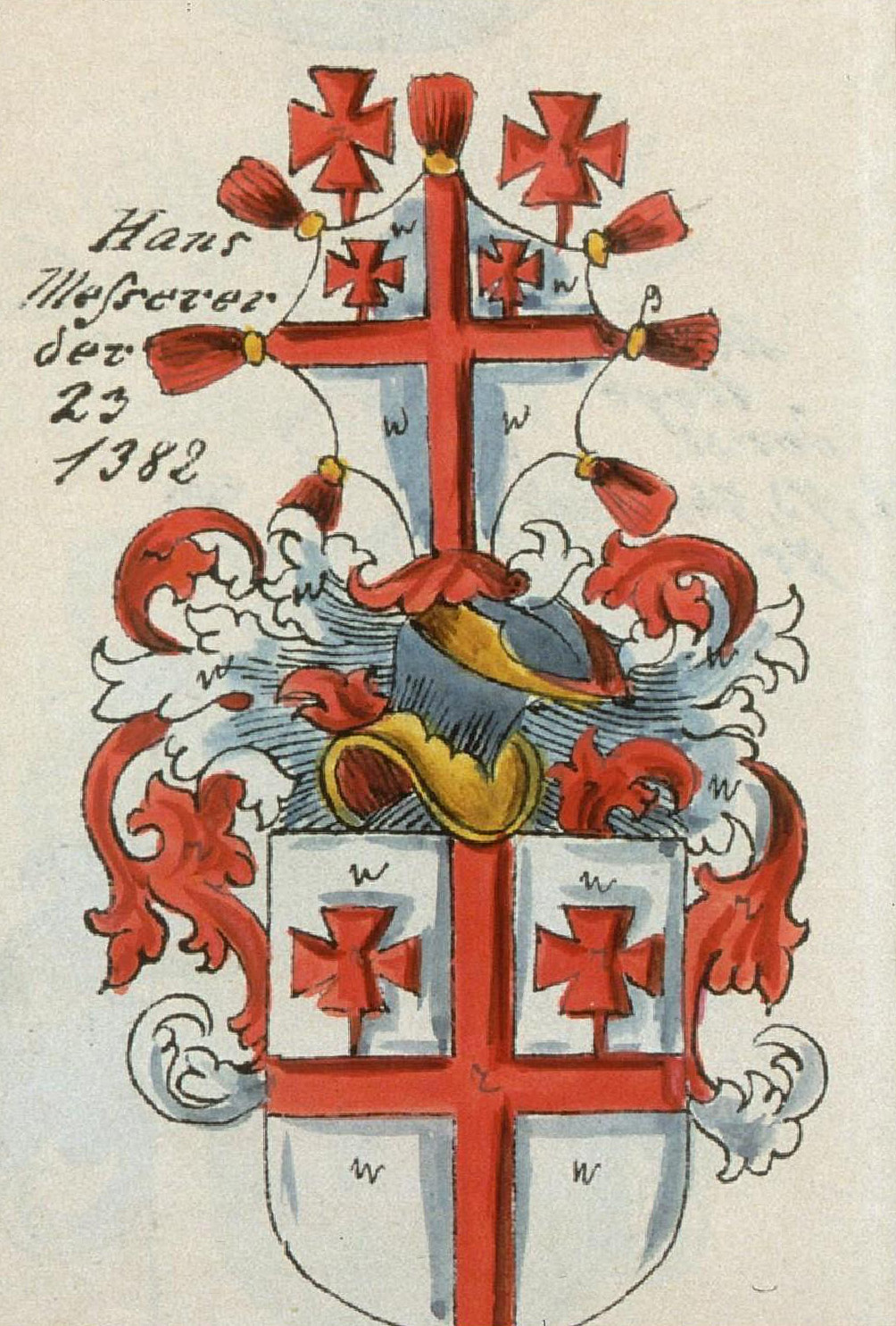 Hans Messerer der 23. Ammeister 1382. Bibliothèque nationale et universitaire de Strasbourg